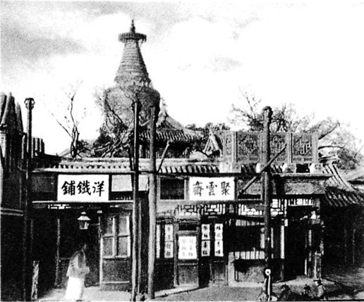 photo from Ein Tagebuch in Bildern